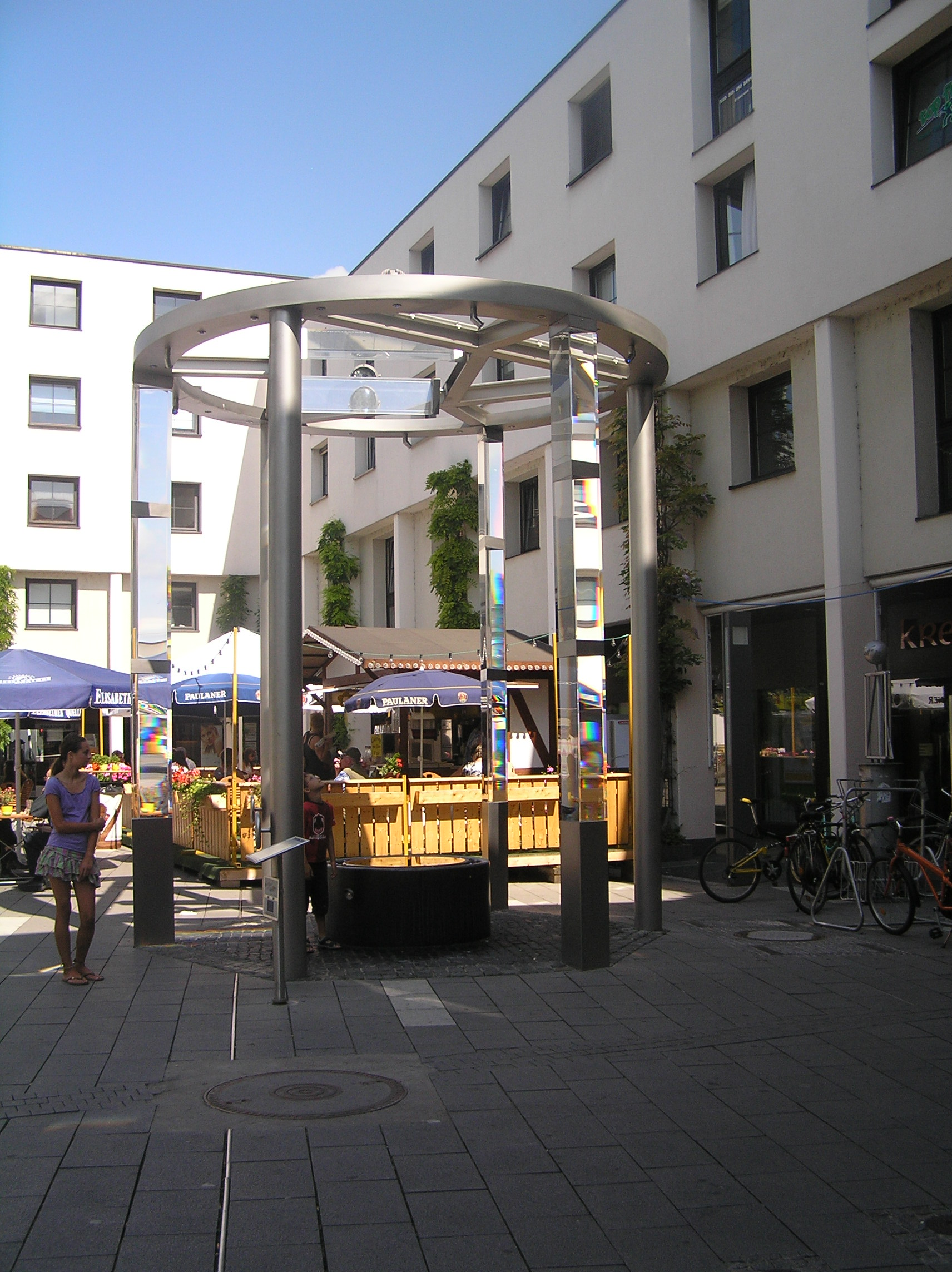 Der Prismenbrunnen, ein Teil des Optikparcours in Wetzlar